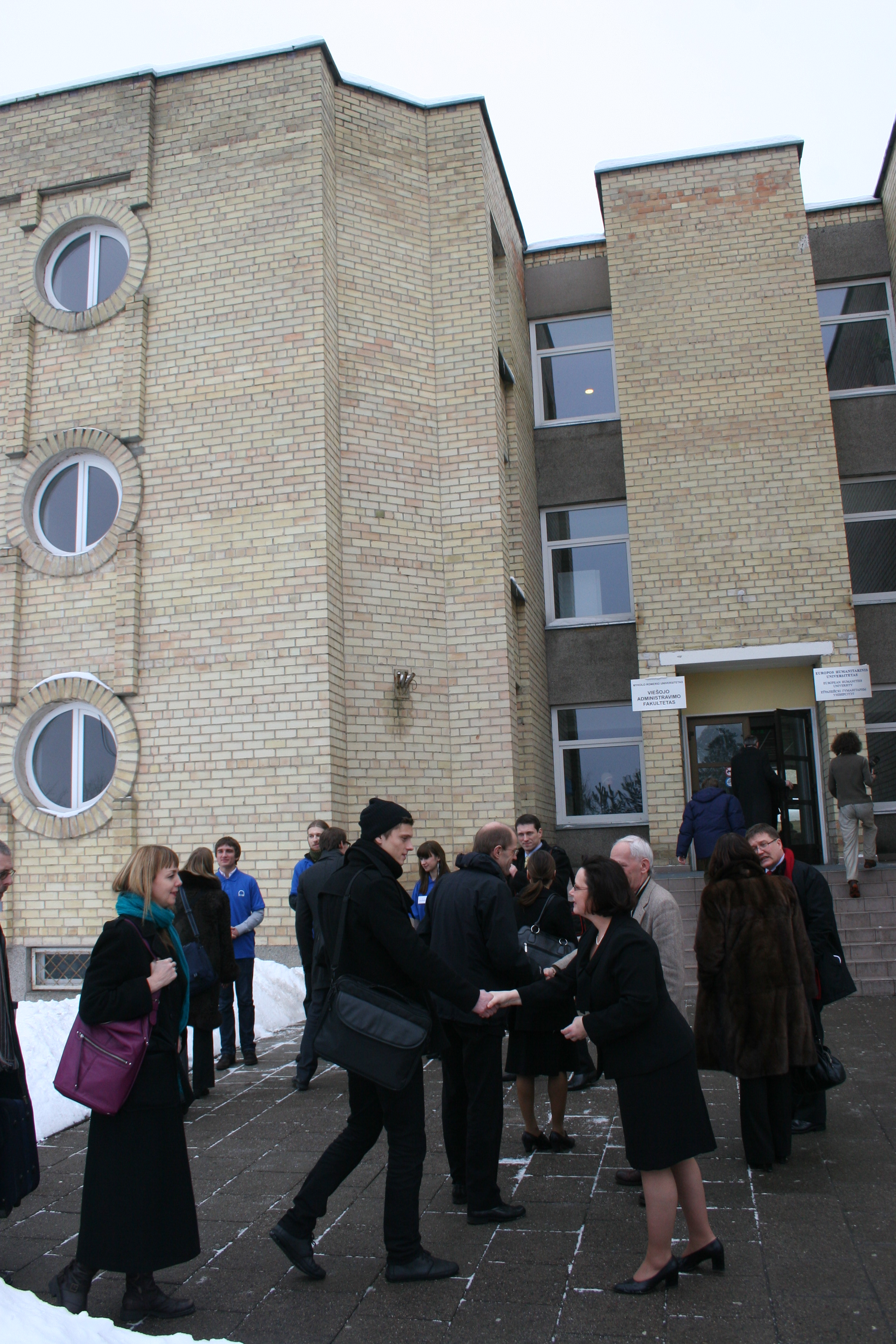 Det hviterussiske eksiluniversitetet i Vilnius, Litauen